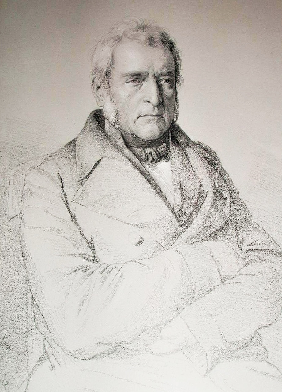 Benedict von Holland, katholischer Priester und Pädagoge in München, geadelt